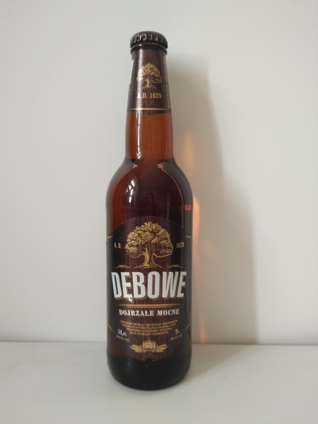 Piwo Dębowe Dojrzałe Mocne